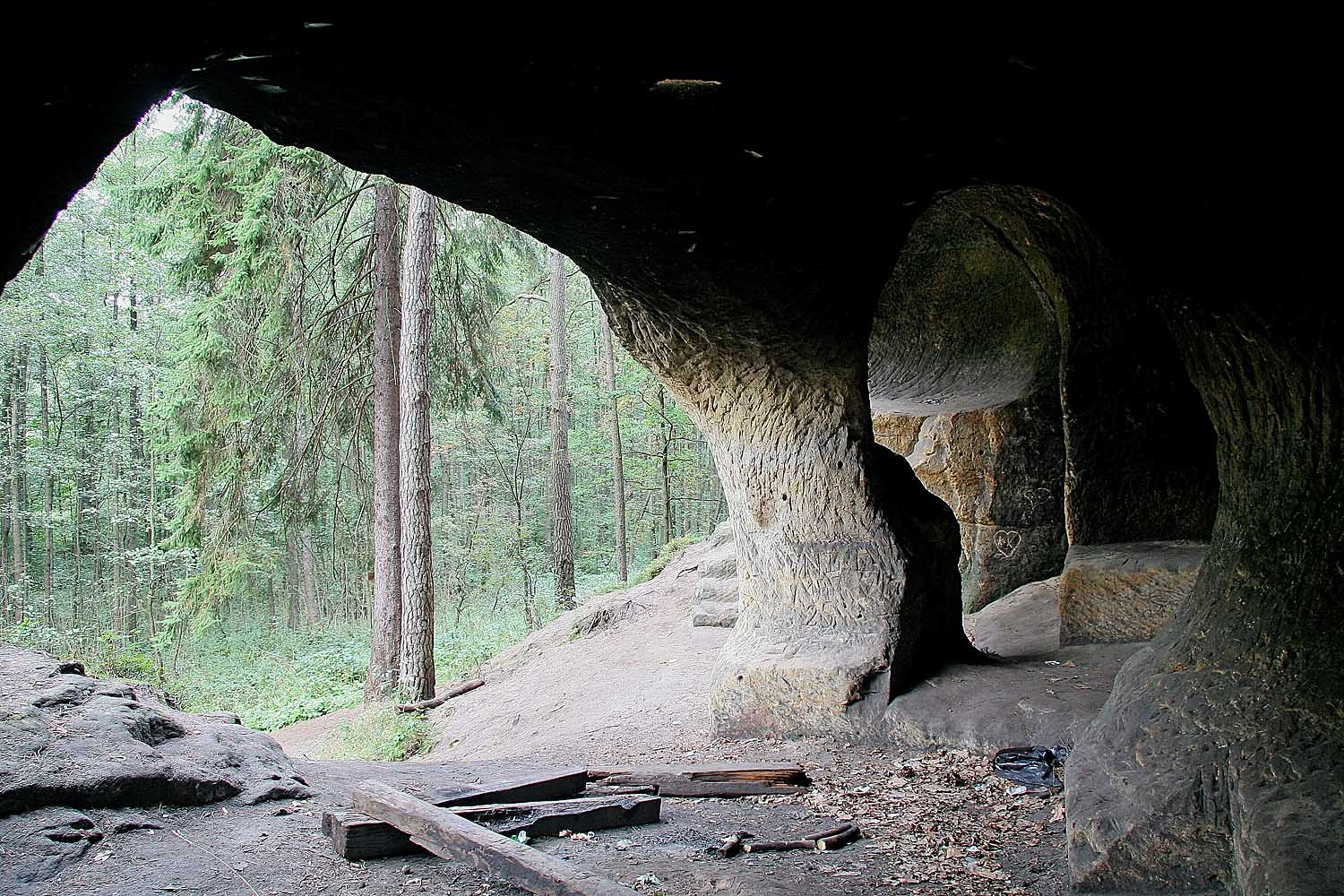 Malá cikánská jeskyně u hradu Sloup v Čechách autor:Prazak date:20. 9. 2006